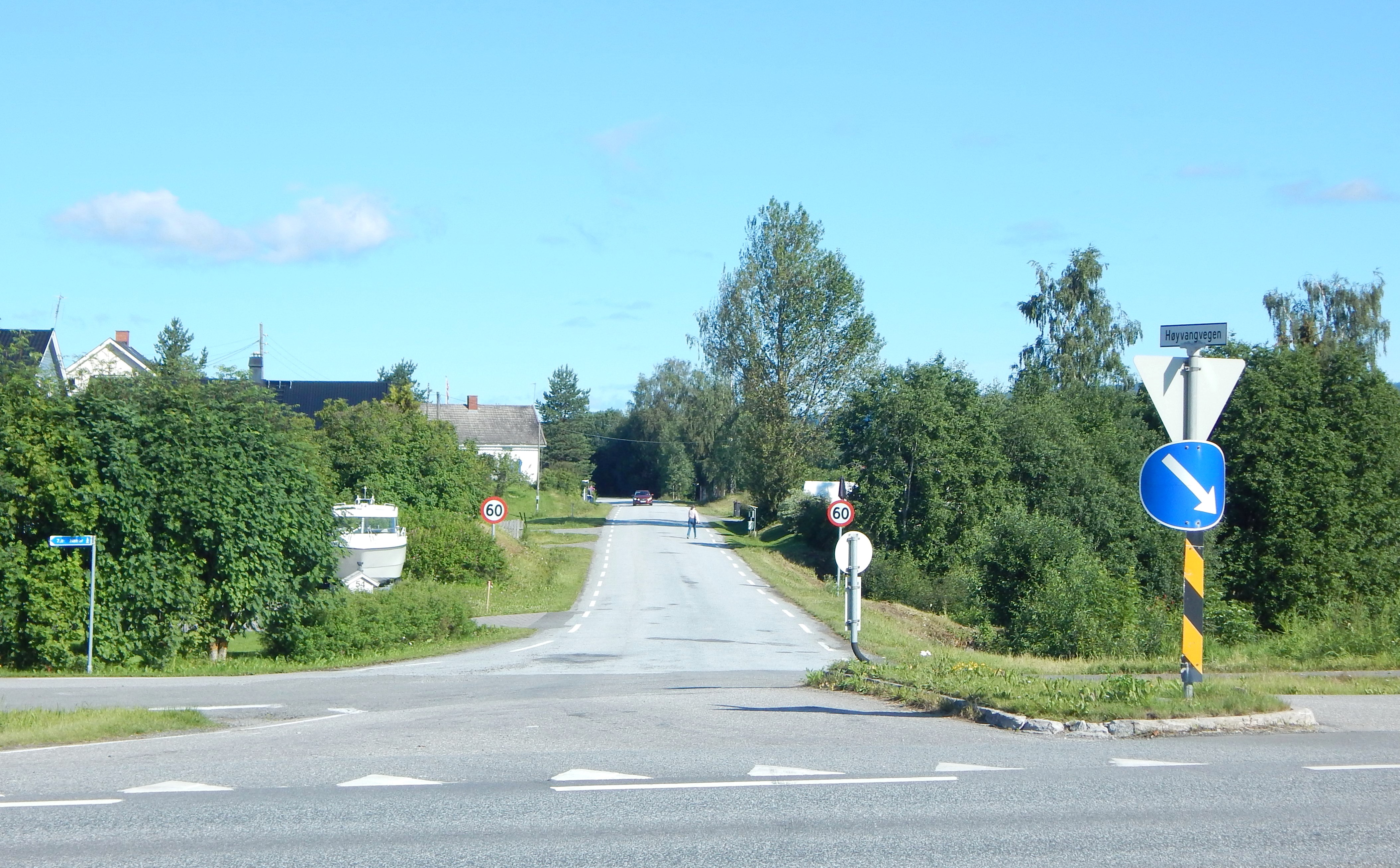 Høyvangvegen (fylkesvei 1804, tidl. 111)